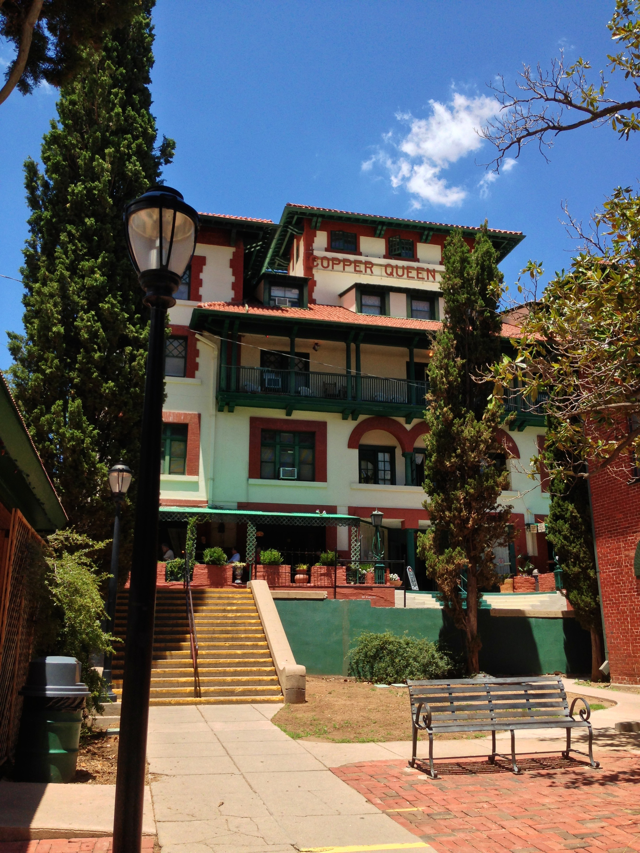 Copper Queen Hotel